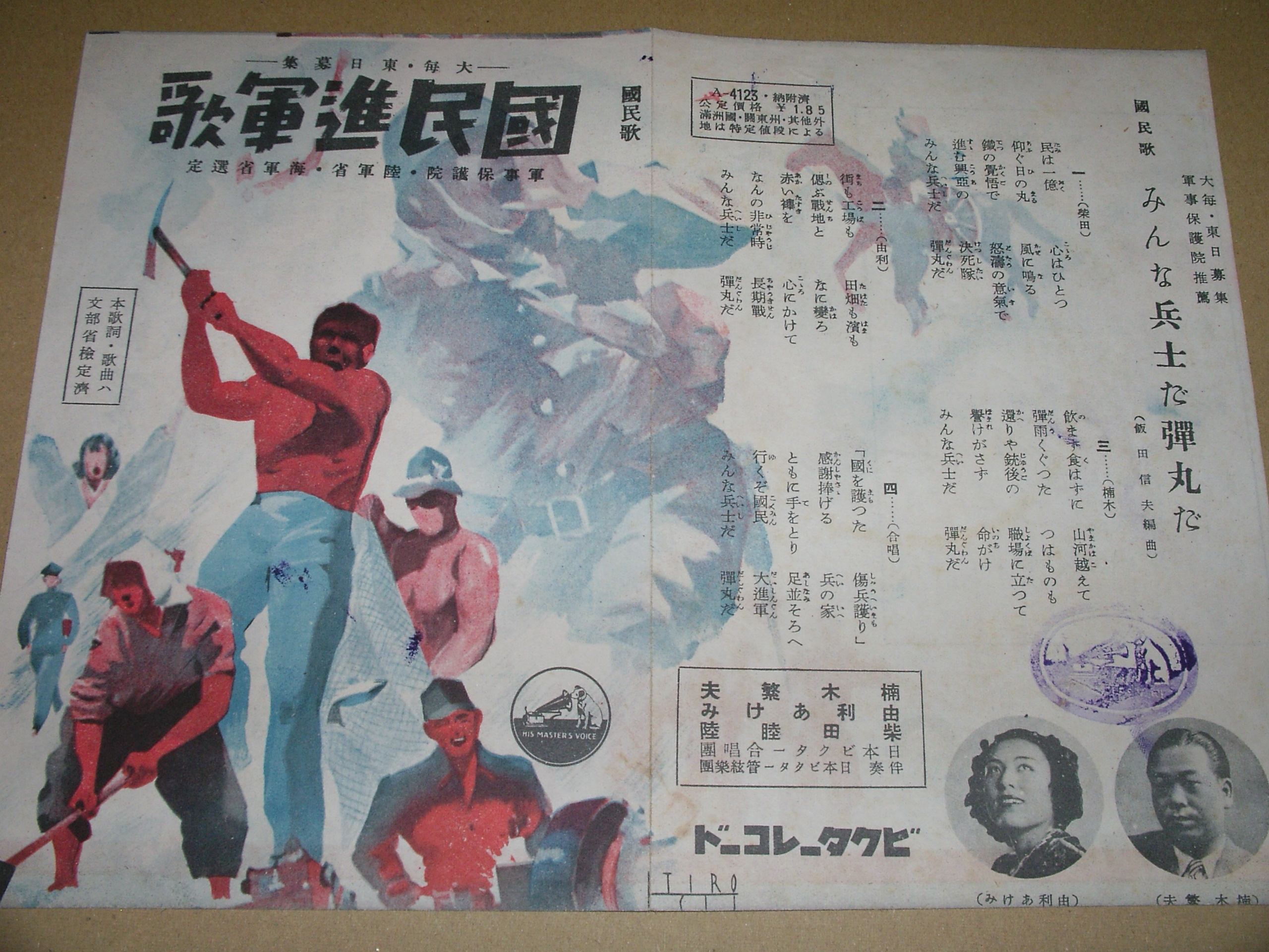 1940年にビクターレコードから発売された国民進軍歌の歌詞カードを撮影。